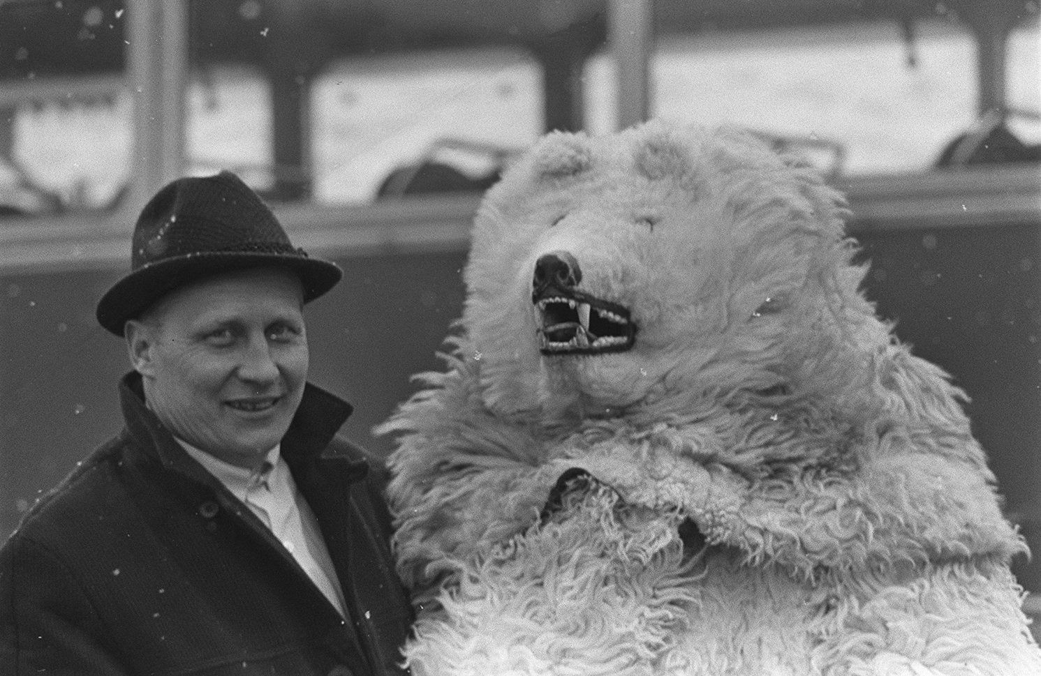 Suomalainen valokuvaaja Kalle Kultala (1924-1991) Puolassa vuonna 1964.